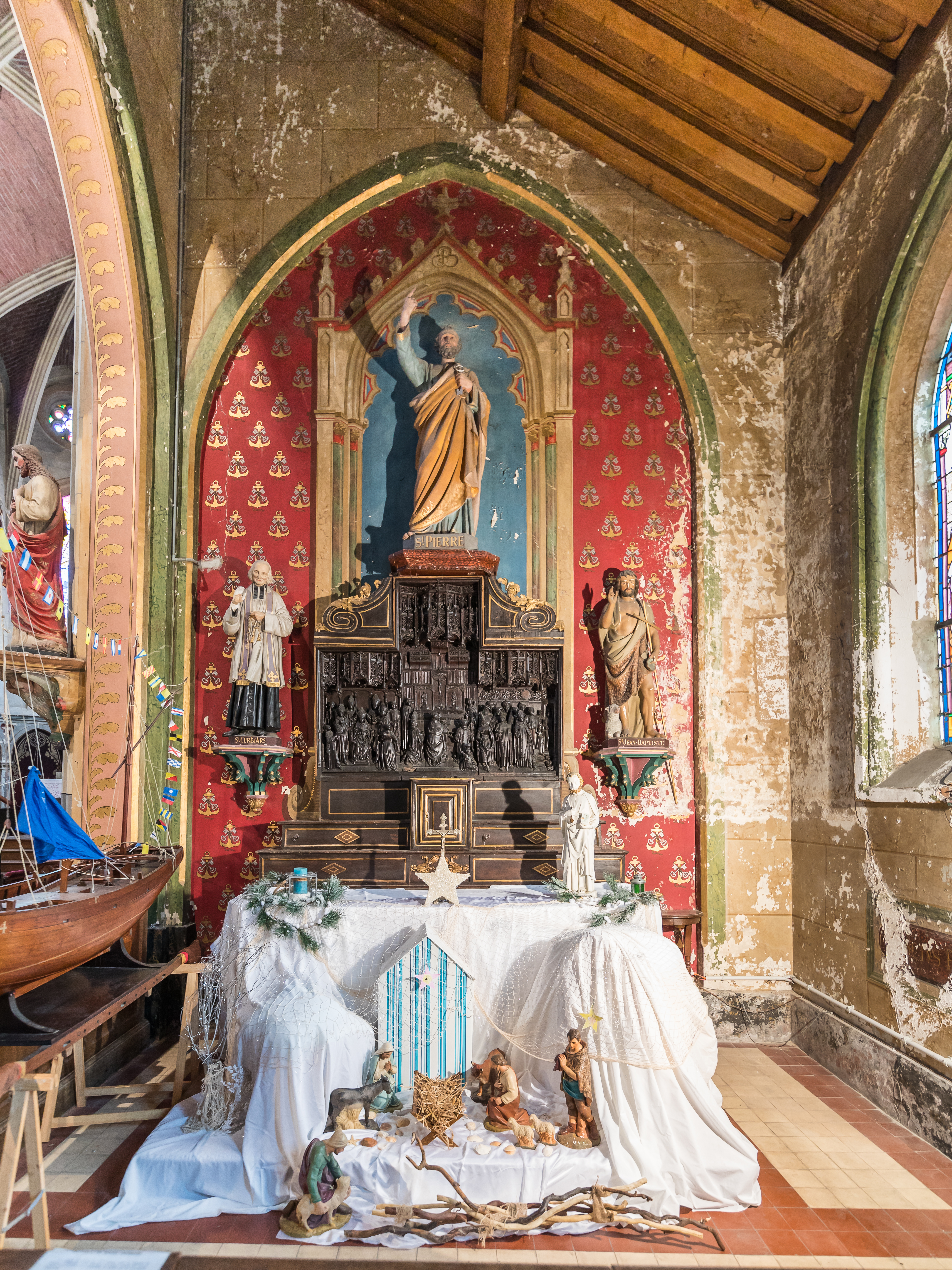 Église Saint-Pierre du Crotoy, autel Saint-Pierre, la crèche.